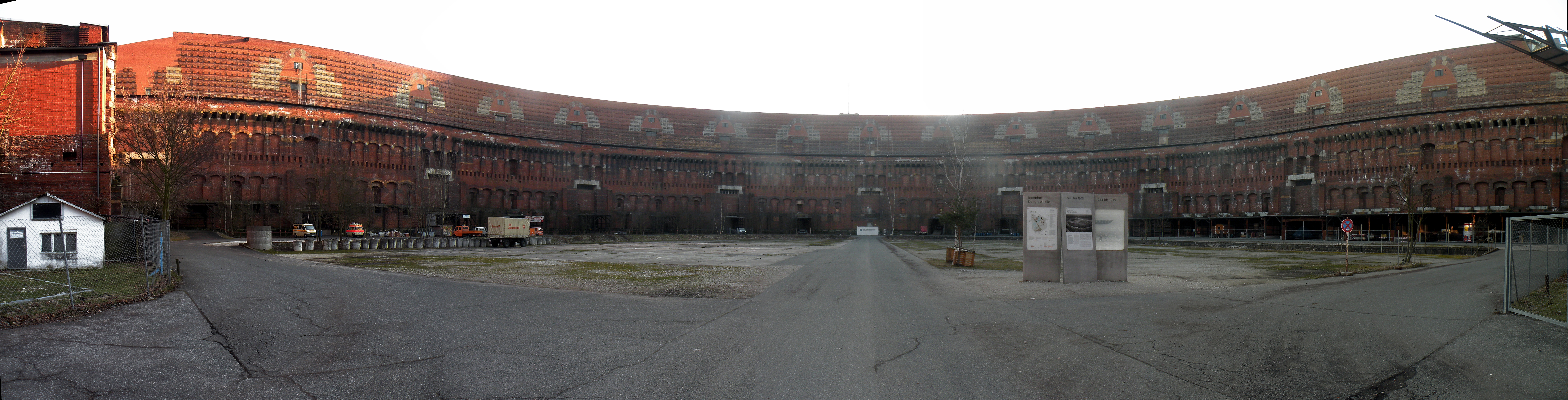 Нюрнберг.Дворец_съездов_изнутри.Вид_на_SW.